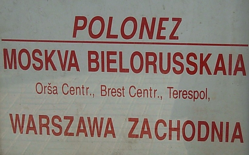 Label on "Polonez" train from Moscow to Warsaw departing Beloruskij Vokazal.